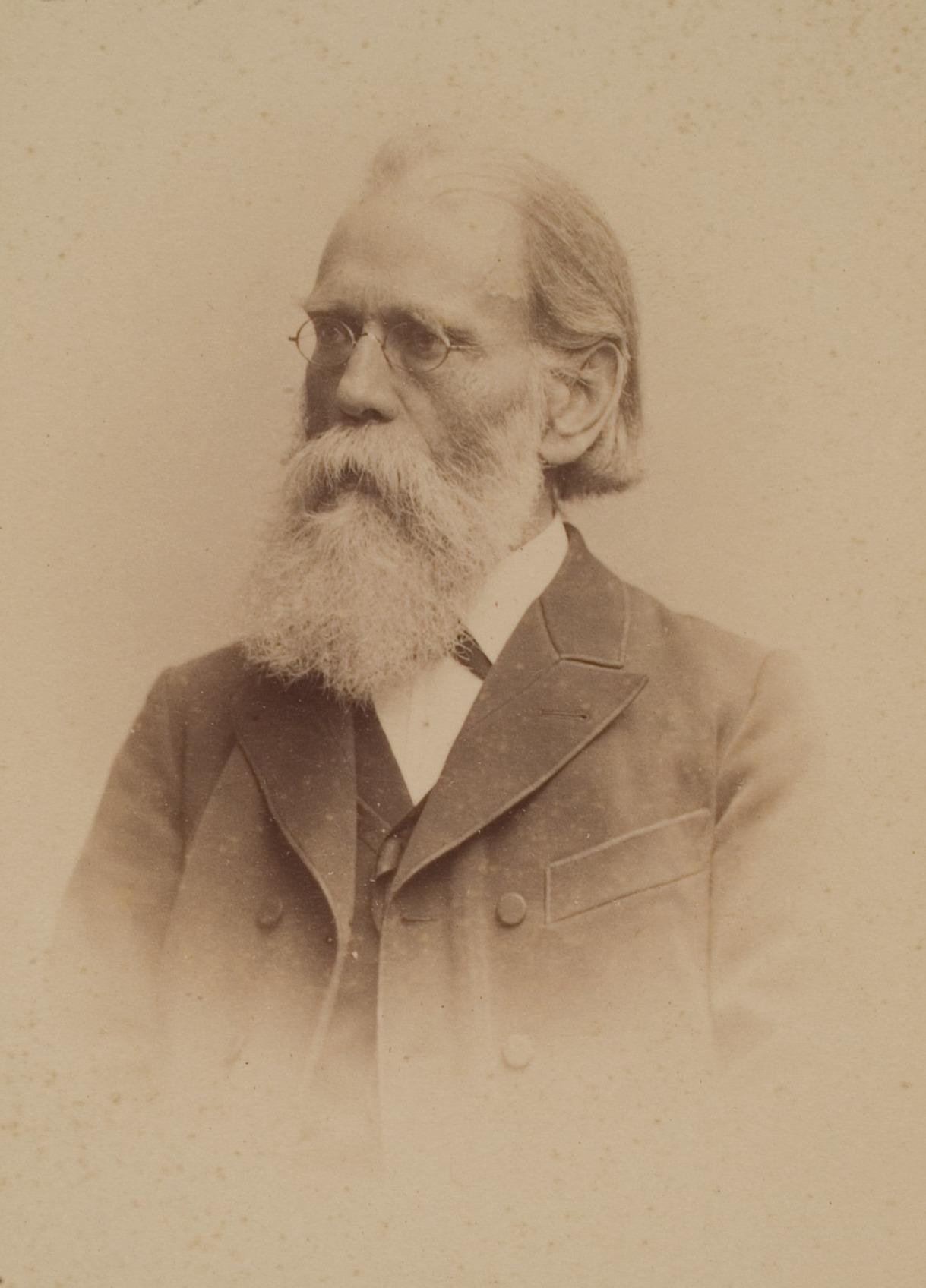 Hermann Schapira, Mathematiker, 1887–1898 Professor in Heidelberg